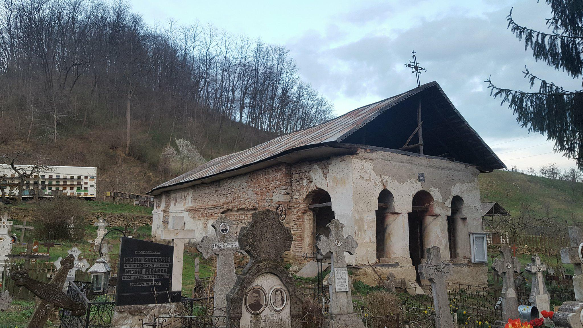 Biserica „Sf. Ioan”, „Sf. Apostoli”, „Sf. Nicolae”